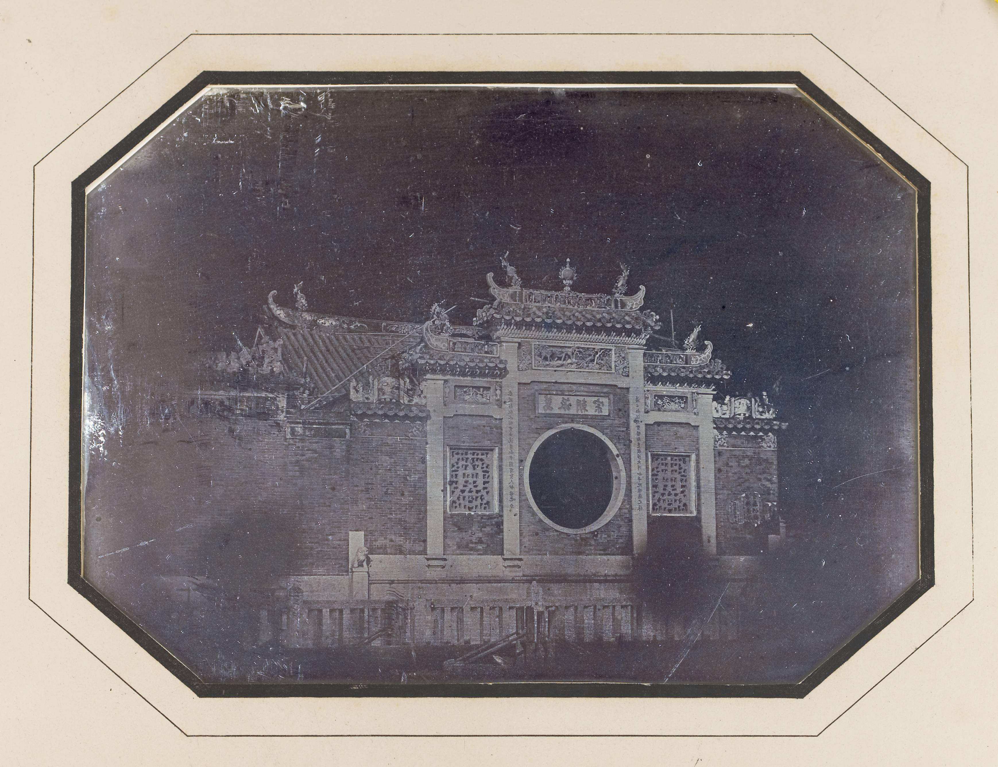 中文（台灣）: 法國業餘攝影師于勒·埃及爾於1844年拍攝的澳門媽祖閣，是中國最早的照片之一